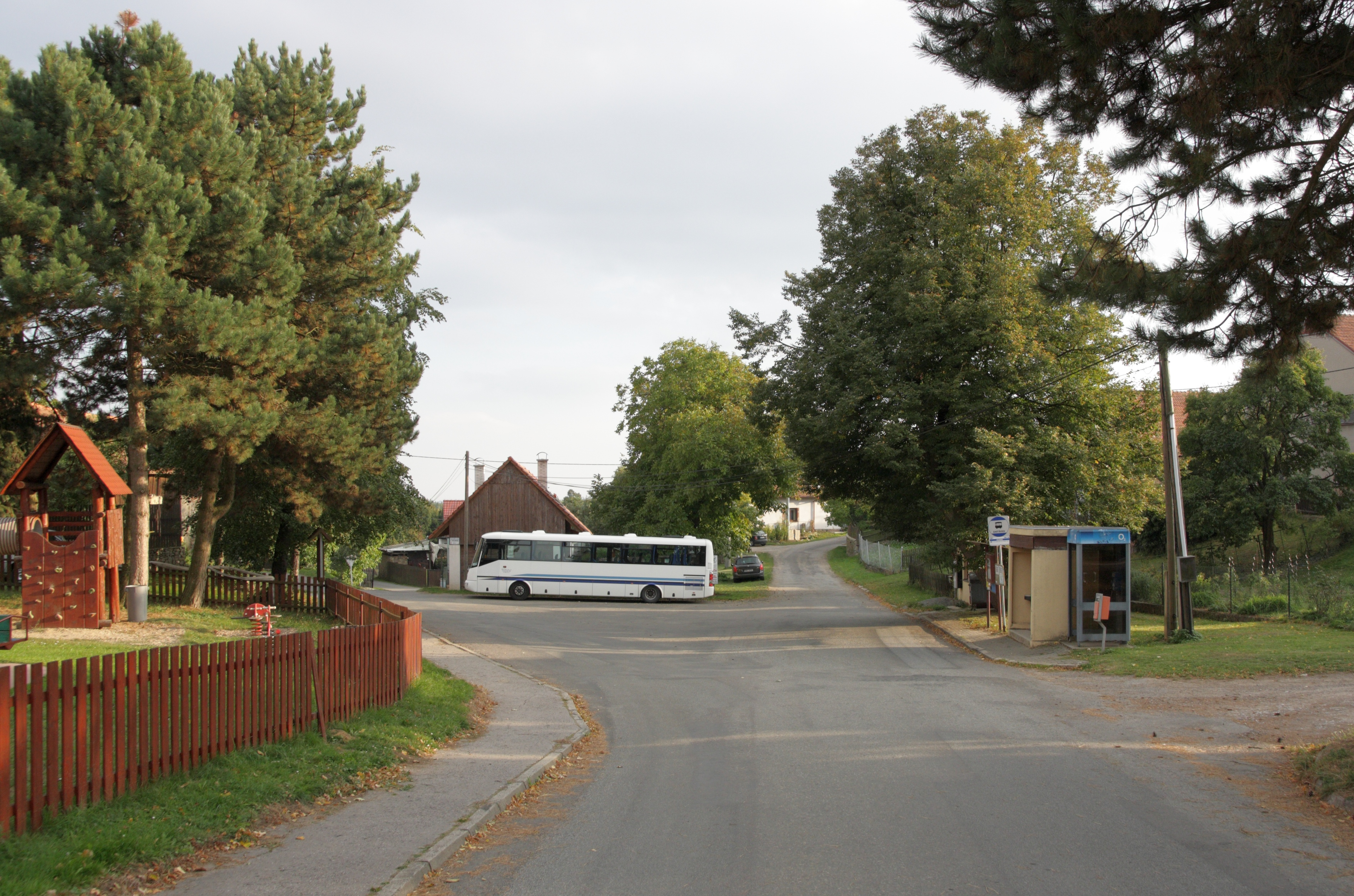 Drahonín - náves.